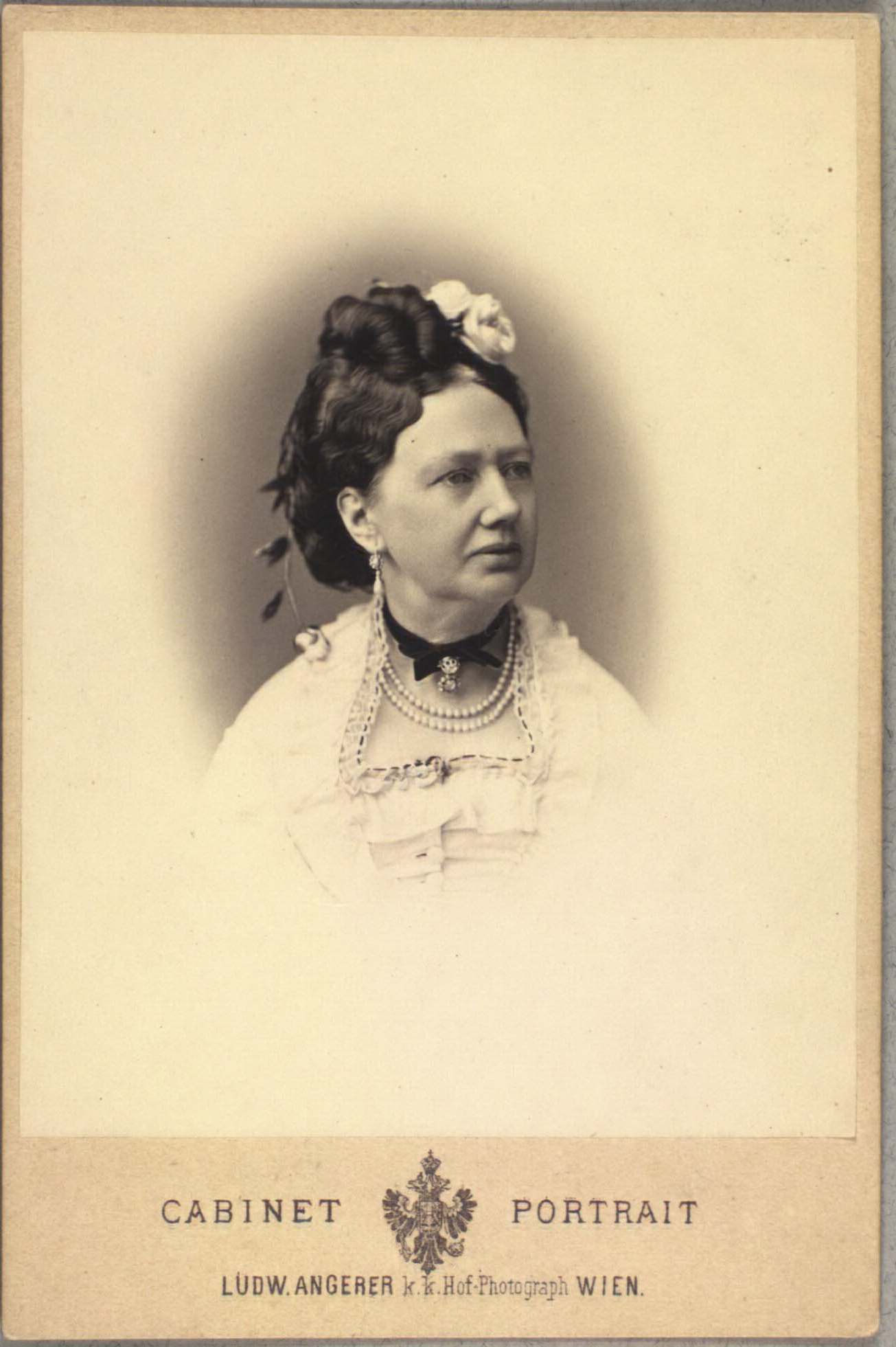 Marie (09.05.1814-28.07.1895) prinsesse af Anhalt Dessau